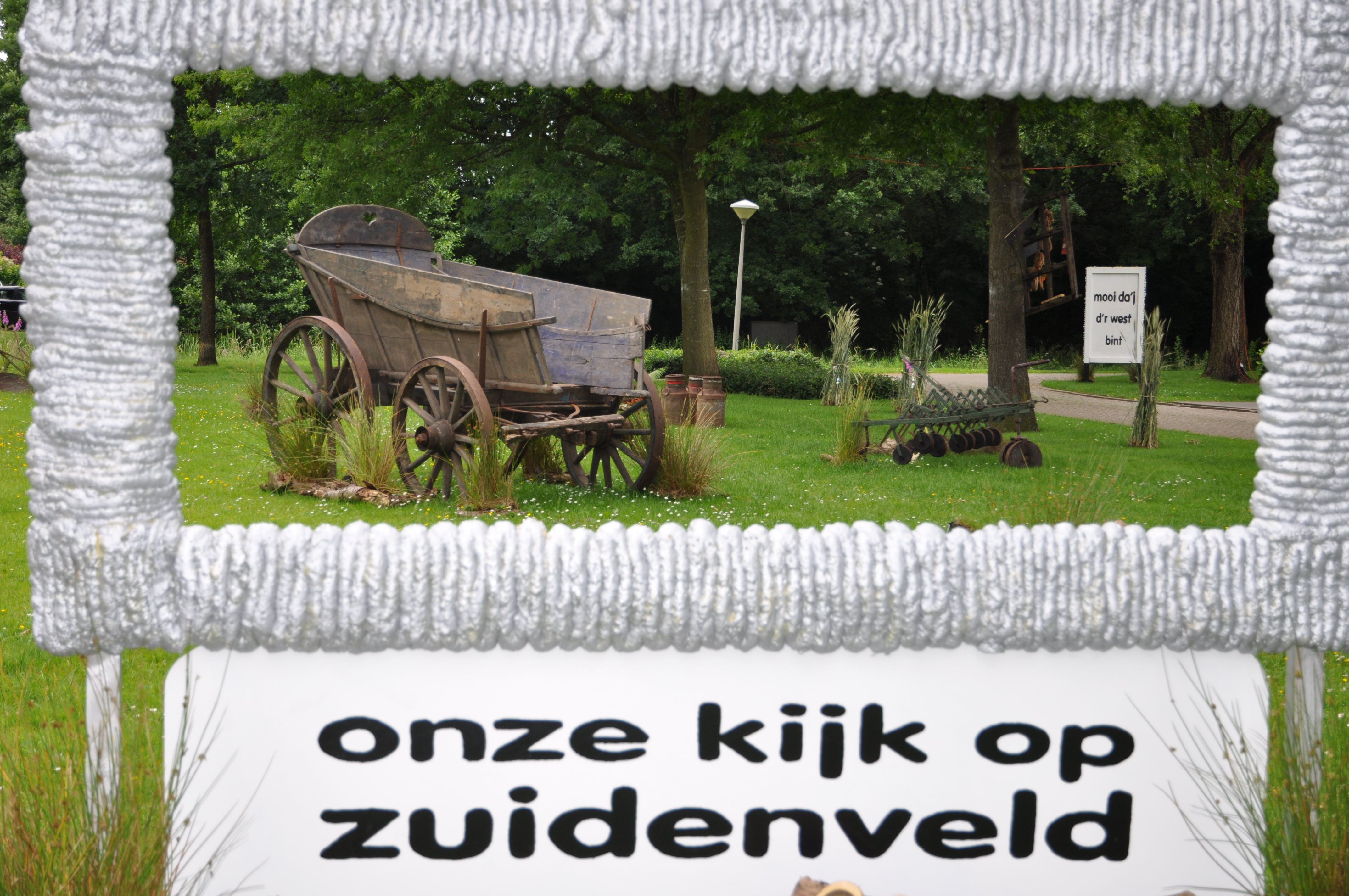 Straatversiering tijdens Zuidenveld Schoonebeek 2012.